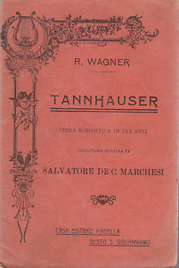 Libretto d'opera